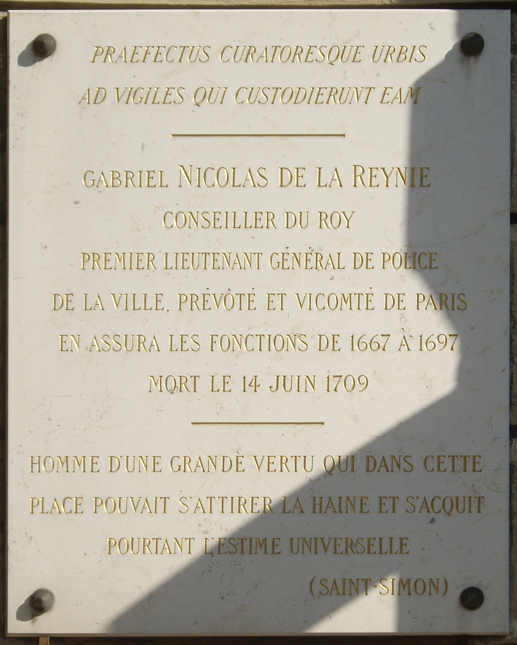 Plaque commémorative à l'entrée de la préfecture de police, rue de la Cité, Paris 4e.« Praefectus curatoresque urbis ad vigiles qui custodierunt eam. — Gabriel Nicolas de La Reynie, conseiller du Roy, premier lieutenant général de police de la ville, prévôté et vicomté de Paris, en assura les fonctions de 1667 à 1697. Mort le 14 juin 1709. — Homme d'une grande vertu qui dans cette place pouvait s'attirer la haine et s'acquit pourtant l'estime universelle (Saint-Simon). »